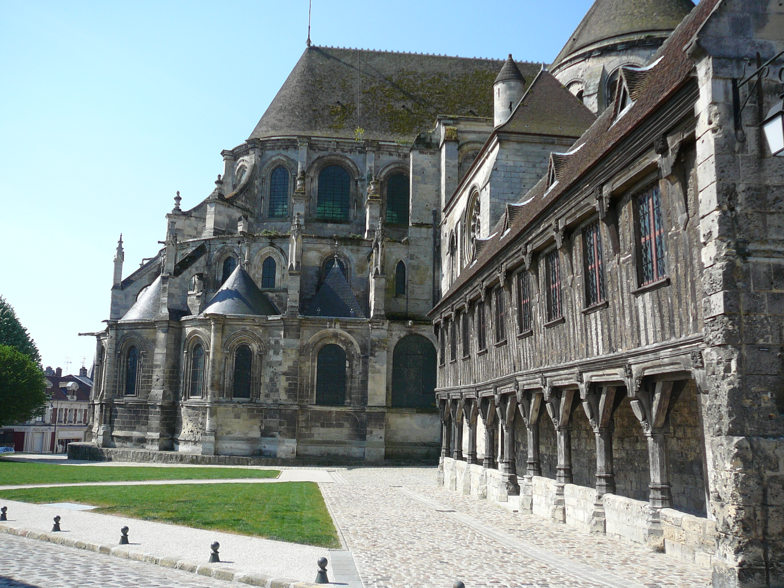 chevet et bibliothèque de la cathédrale de Noyon, France